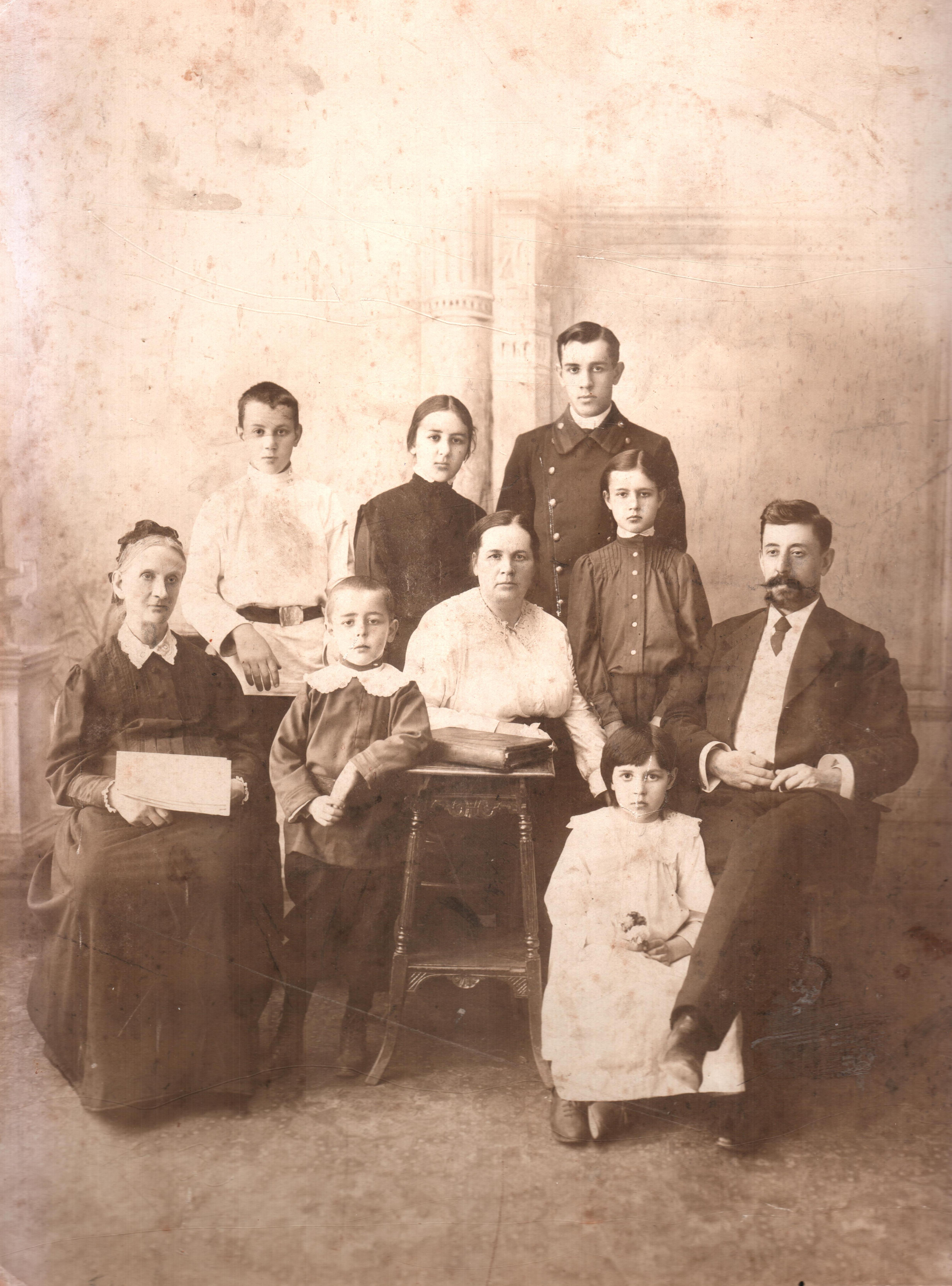 Фото семьи Мансурова Н.А. из семейного архива Мансурова Александра Николаевича